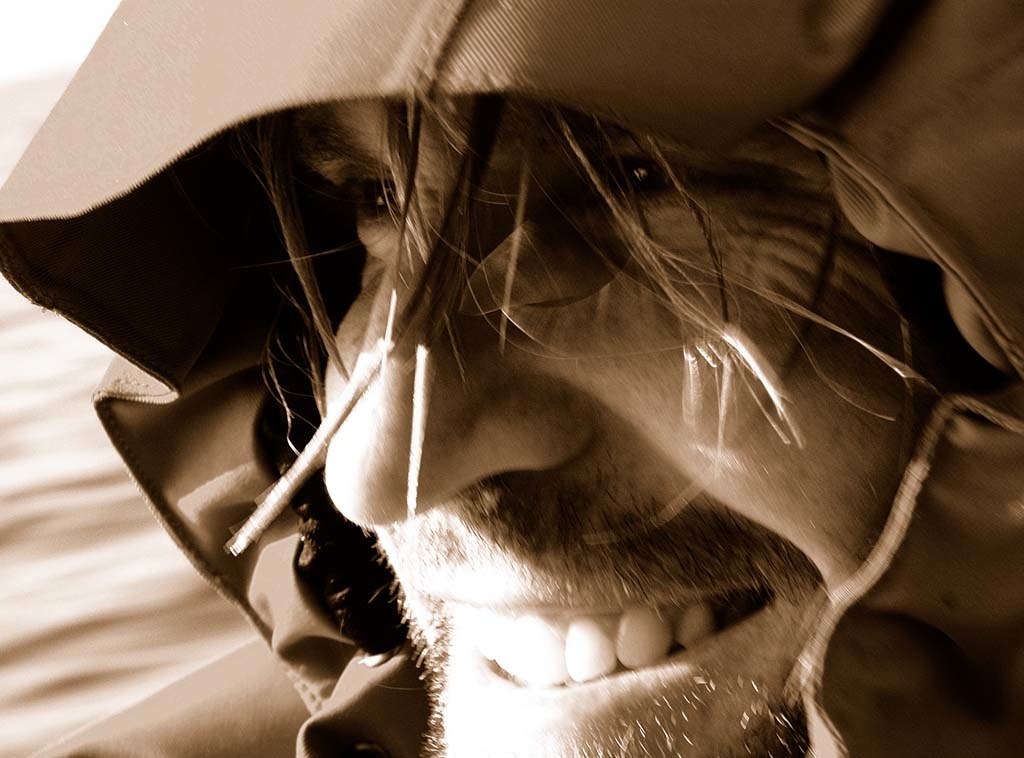 Loïc Leferme recordman, du monde apnée No-Limit